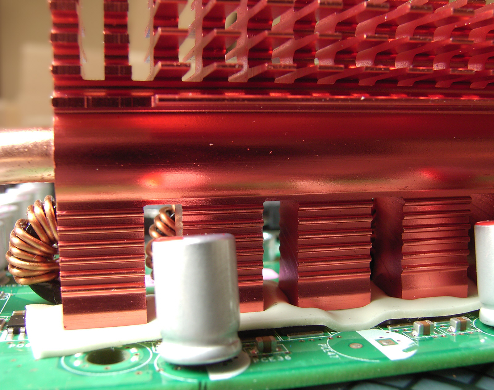 Elastisches Wärmeleitpad, hier zur Kühlung der Leistungshalbleiter eines Spannungsreglers auf einem Mainboard eingesetzt